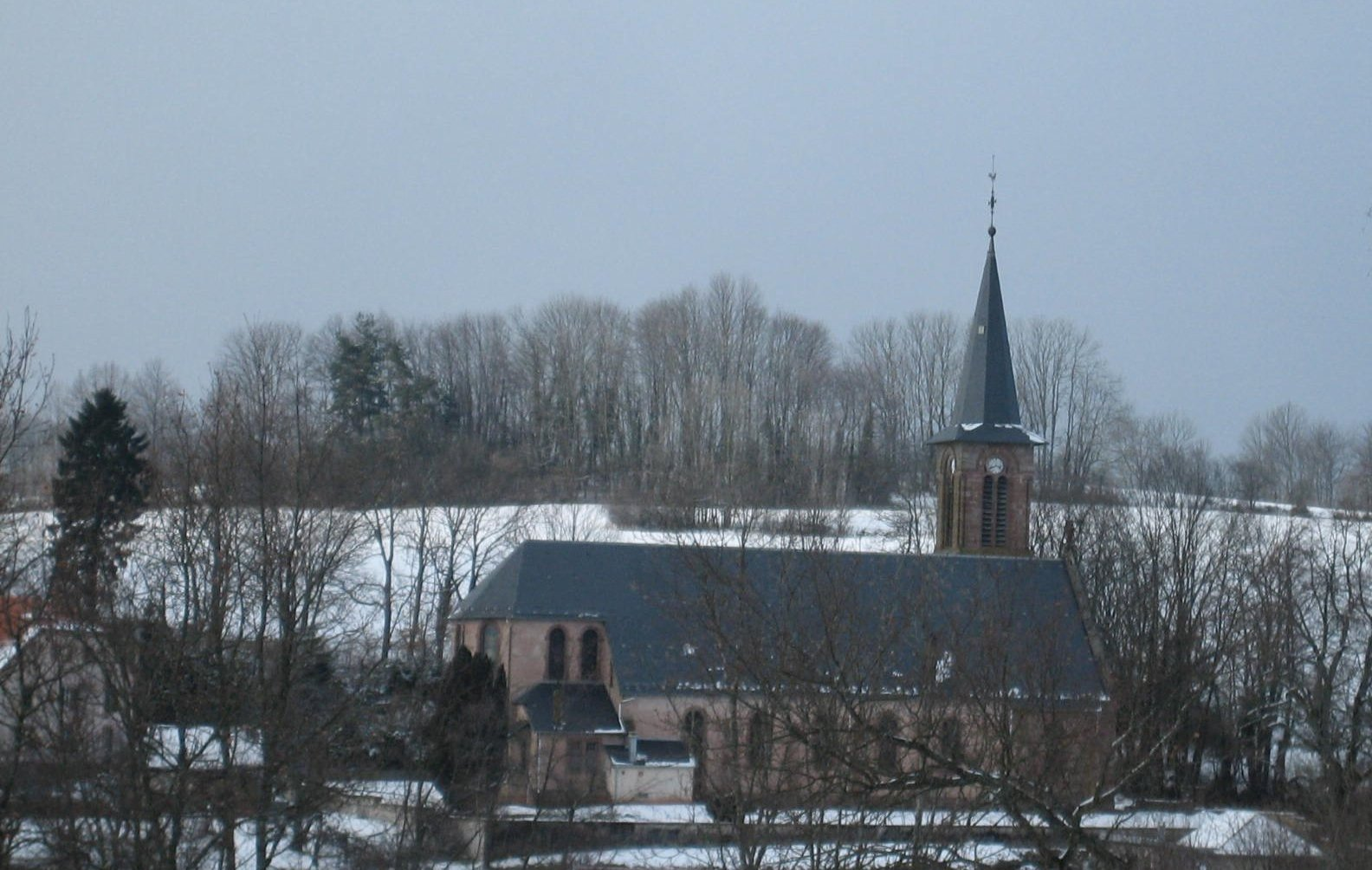 {fr} église du Ban-de-Sapt dans le hameau de Launois (88210) France vue du jardin de Callunes